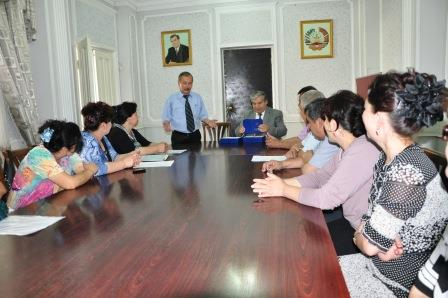 Ученый совет в ХГУ им. Б. Гафурова. Зав. кафедрой Института повыш. квал. высш образов учреждений РТ при ТНУ Саъдиев Шухрат и Проректор по учебной работе ХГУ им. Б. Гафурова Рахимов Абдуфаттох, (ХГУ, май 2013 г.)Тоҷикӣ: Мудири каф. Донишк.такм.ихтисоси ОМТОК назди ДМТ Шуҳрат Саъдиев ва ноибректор оид ба кори таълимии ДДХ ба номи акаадемик Б.Ғафуров Абдуфаттоҳ Раҳимов дар ҷаласаи Шурои олимони ДДХ ба номи акад Б. Ғафуров, ш. Хуҷанд, май с. 2013